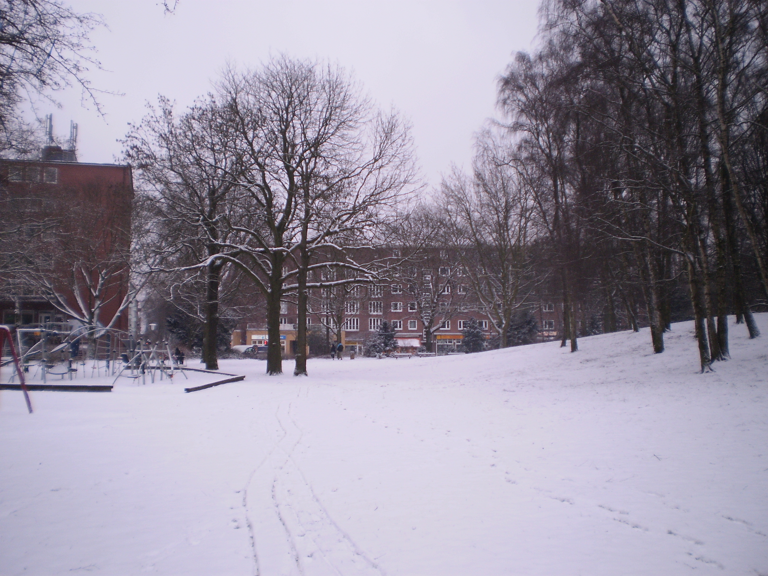 Unnapark in Hamburg Eimsbüttel, mit Blick in Richtung Osten (Heußweg)